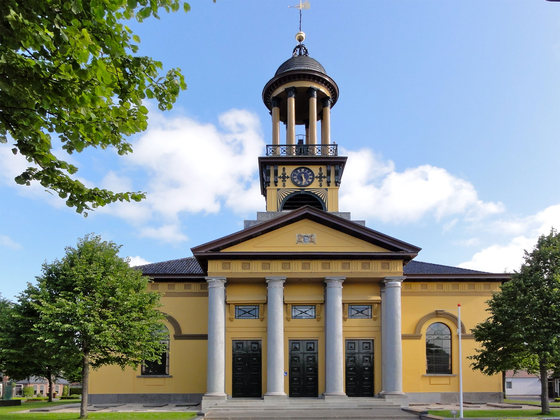 Groate Kerk in Sint Jacobiparochie